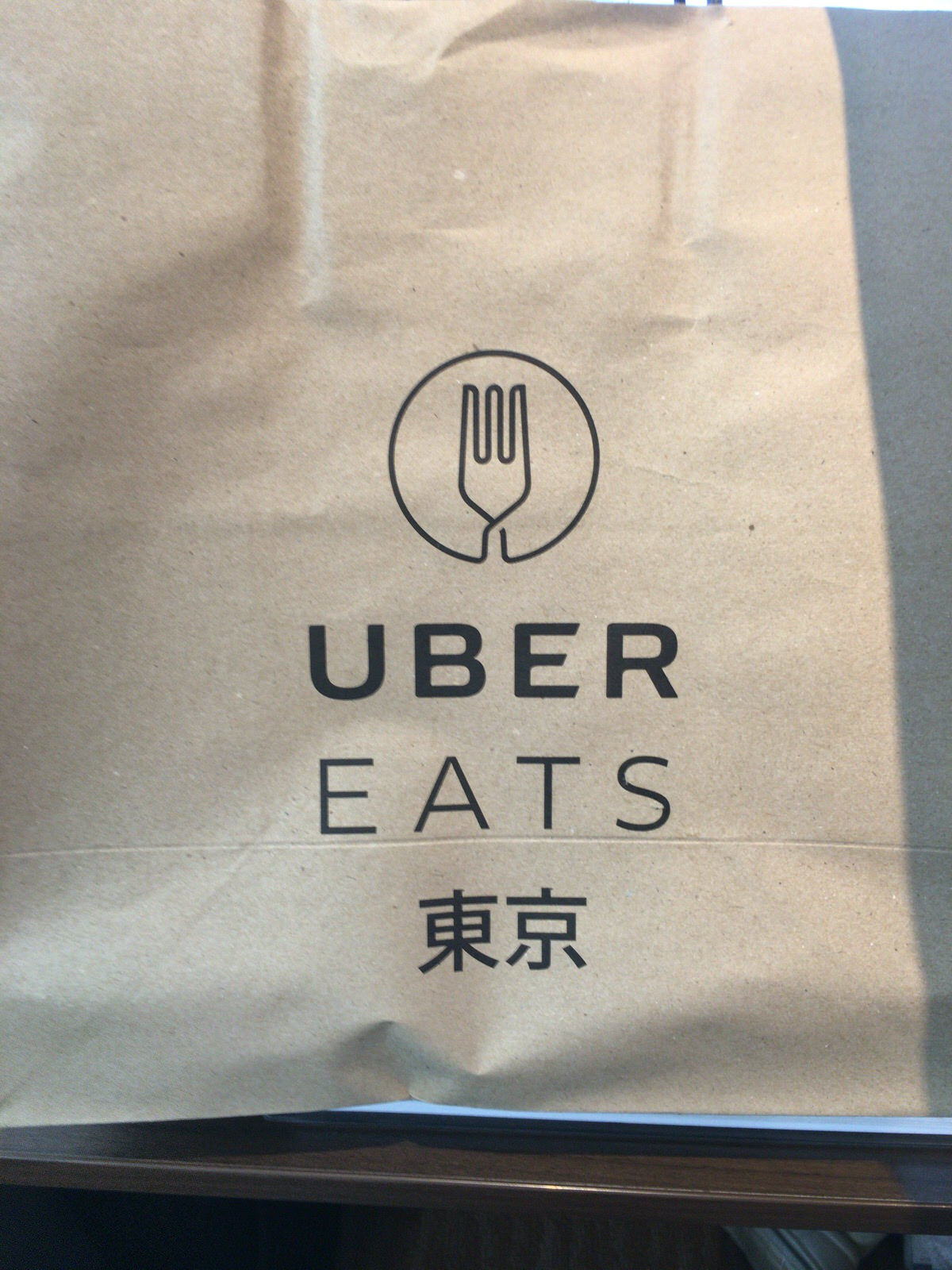 uberEATS in Japan